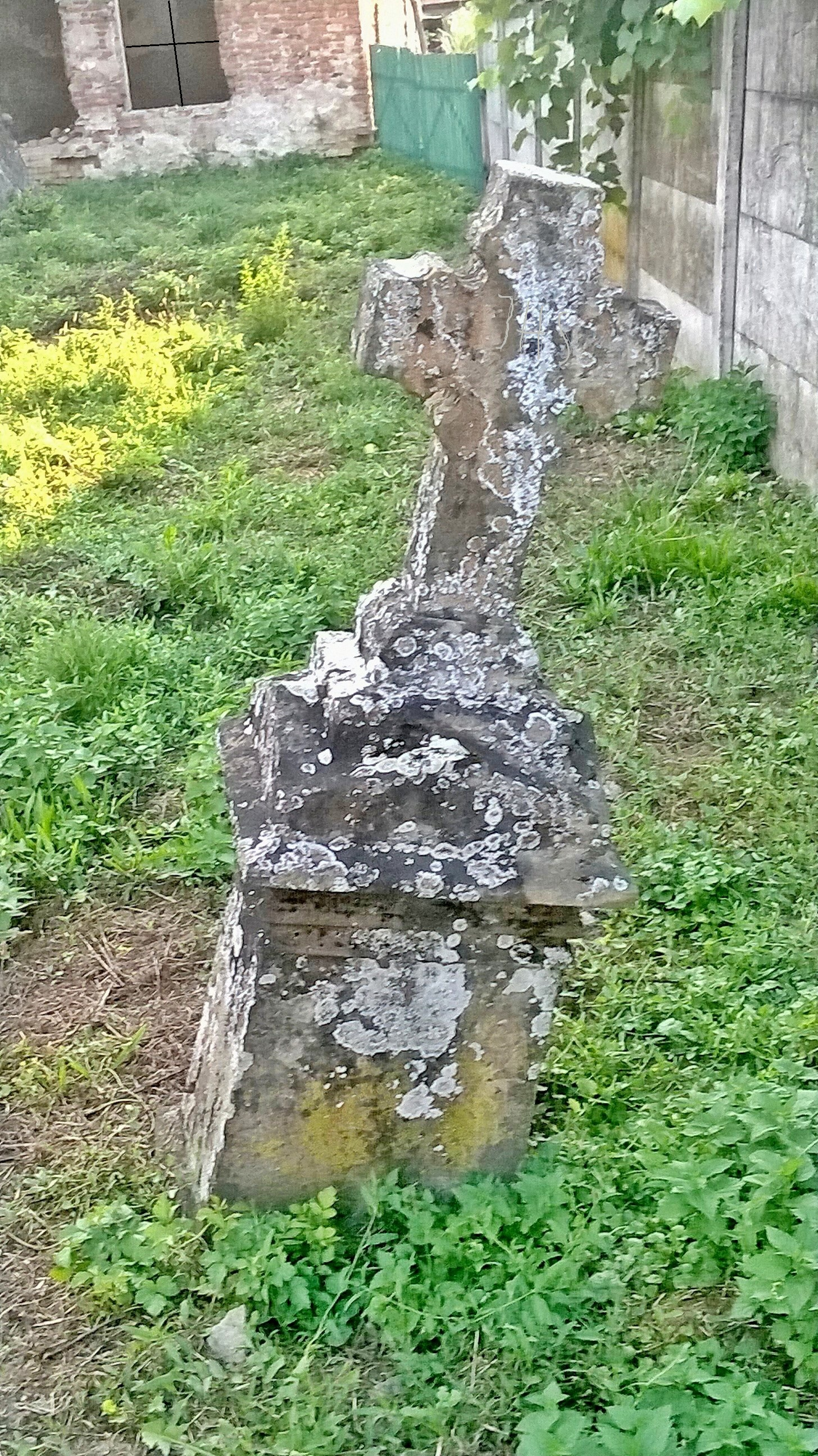 mormânt catolic ilia